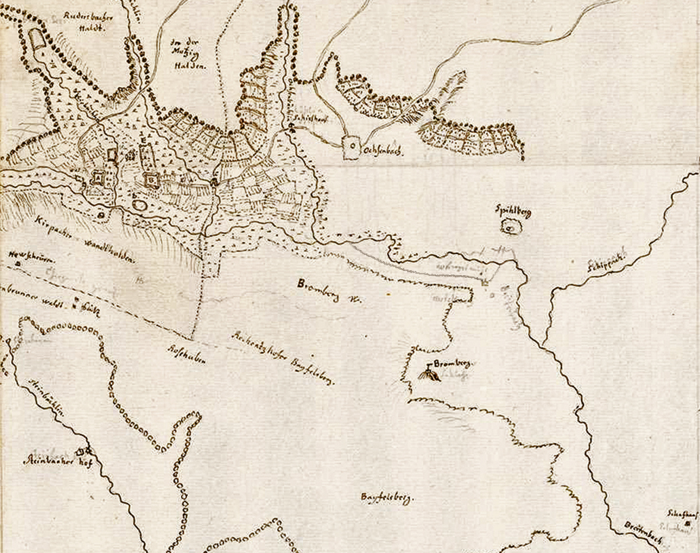 Ausschnitt mit verstärktem Kontrast aus der genordeten Karte Die Gegend um Kirbach mit der Burg Bromberg auf dem heutigen Gewann Schlössle an der Nordabdachung des Baiselsbergs. Die Bromberger Mühle und ihr Mühlgraben wurden mit Bleistift nachgetragen; der Kirbach Breitenbach geschrieben.